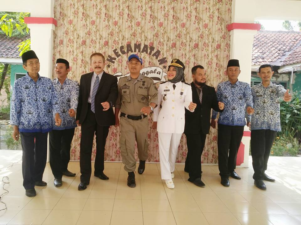 ASN Kecamatan Suranenggala yang siap memberikan pelayanan